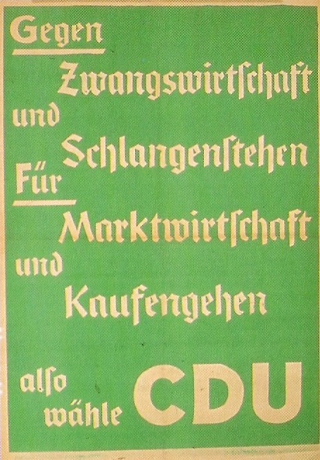 Wahlplakat der CDU im Landtagswahlkampf 1947: Gegen Zwangswirtschaft